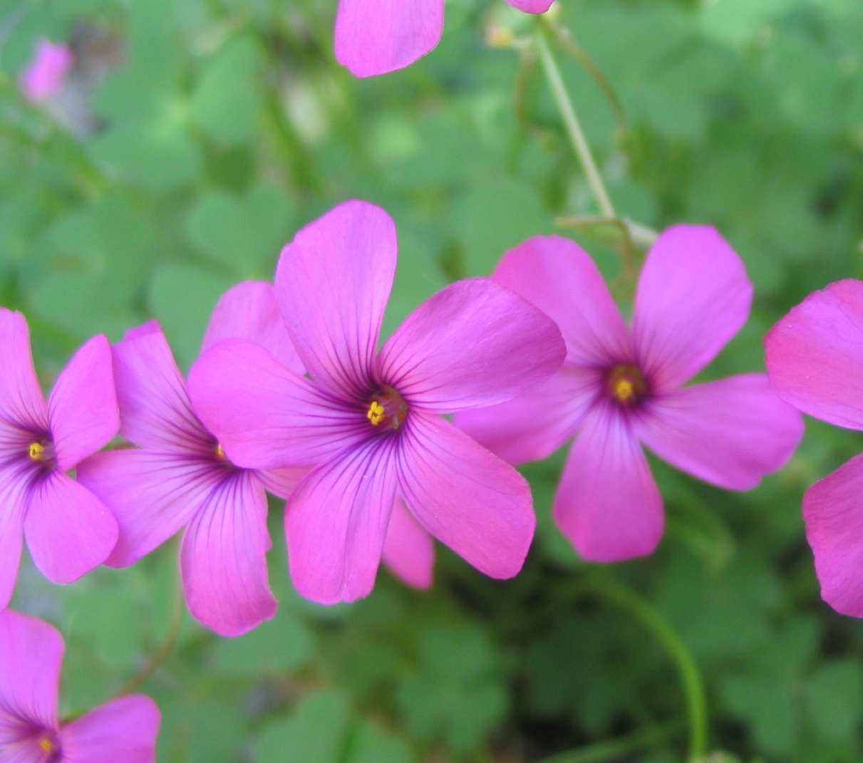 Flores de color magenta.